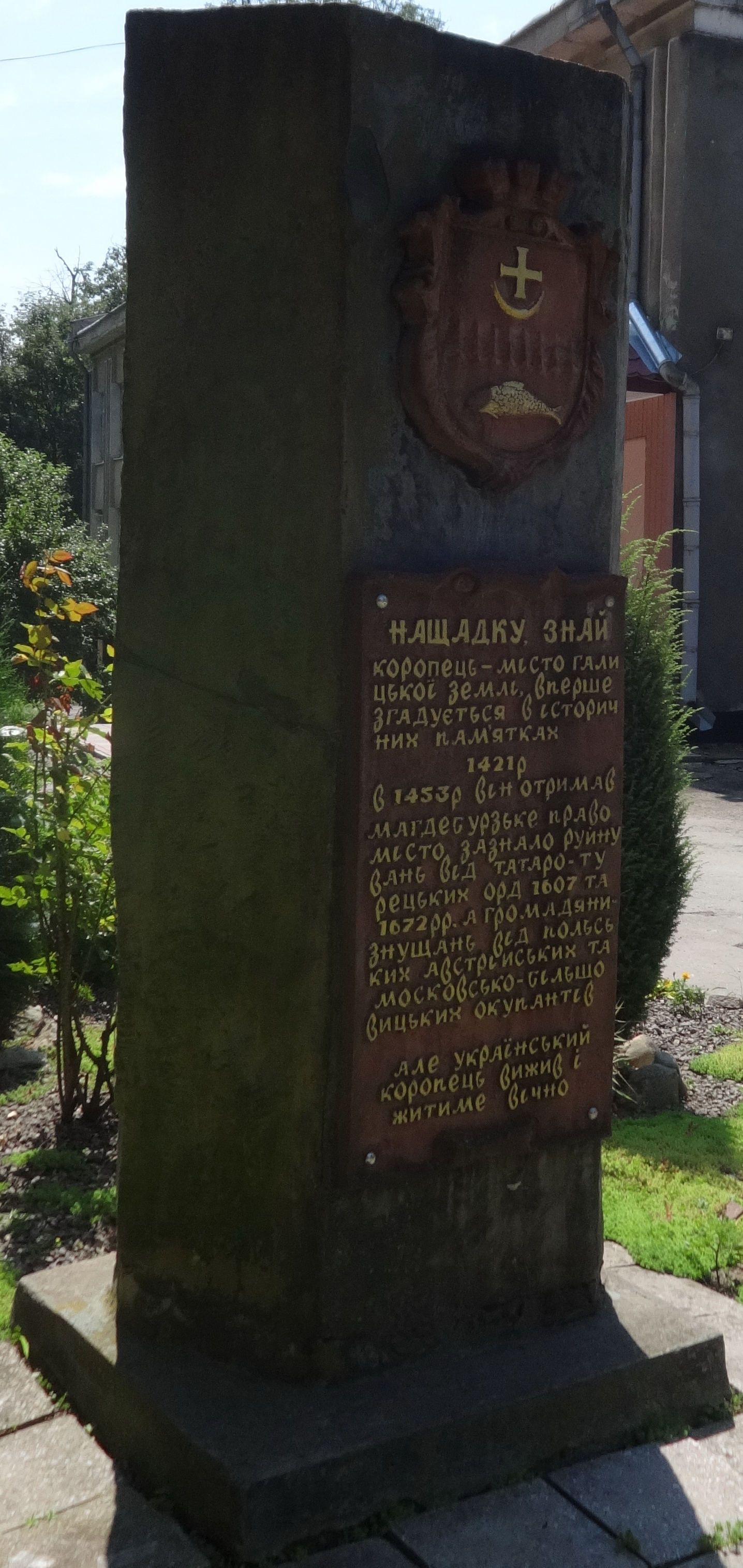 Пам'ятний знак з нагоди надання магдебурзького права смт.Коропець